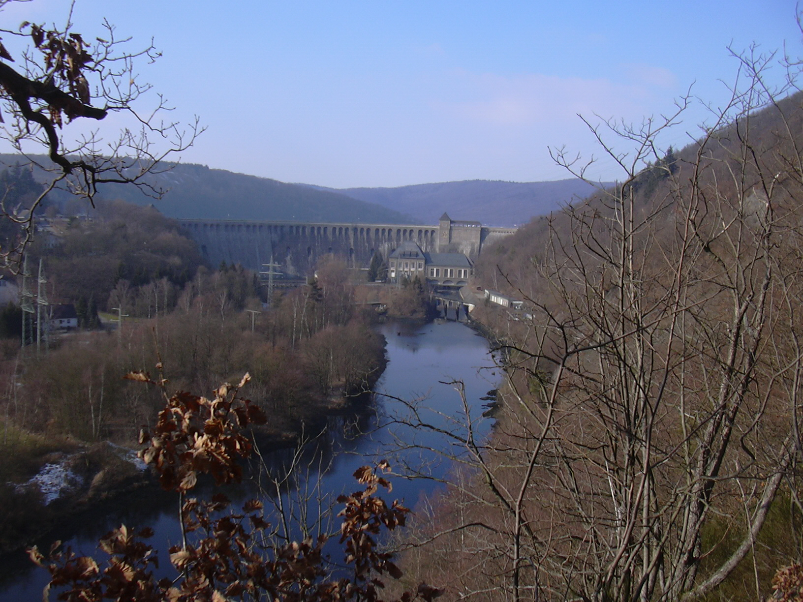 Abfluss der Eder südlich der Staumauer; selbst gemacht von Gabriele Delhey am 25. Februar 2006.